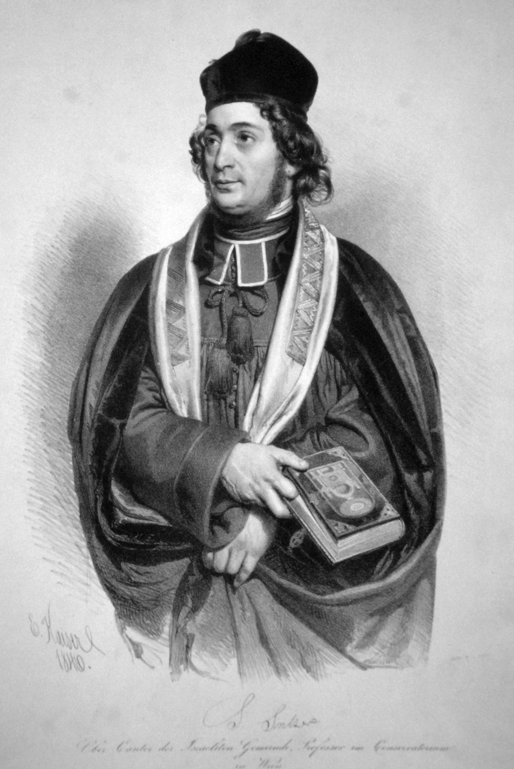 Salomon Sulzer (1804-1890), Oberkantor in Wien, Komponist. Lithographie von Eduard Kaiser, 1840